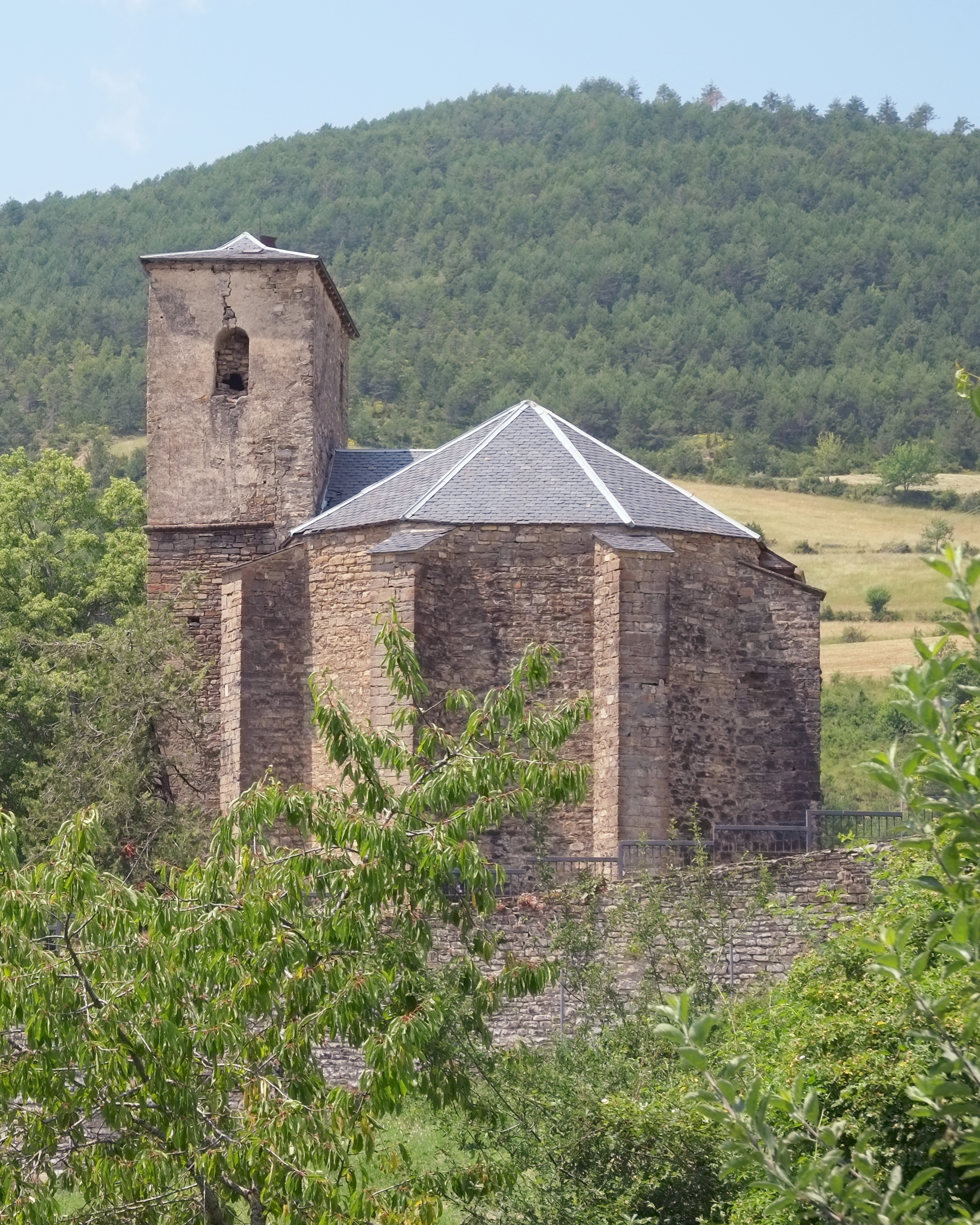 Kirche Santa Eulalia Borau in der Provinz Huesca in Aragonien (Spanien)